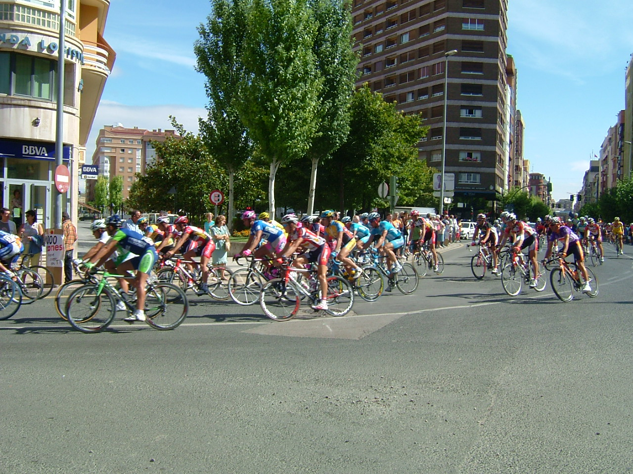 Pelotón en la salida neutralizada de la Vuelta a Burgos en la ciudad de Miranda de Ebro (España).